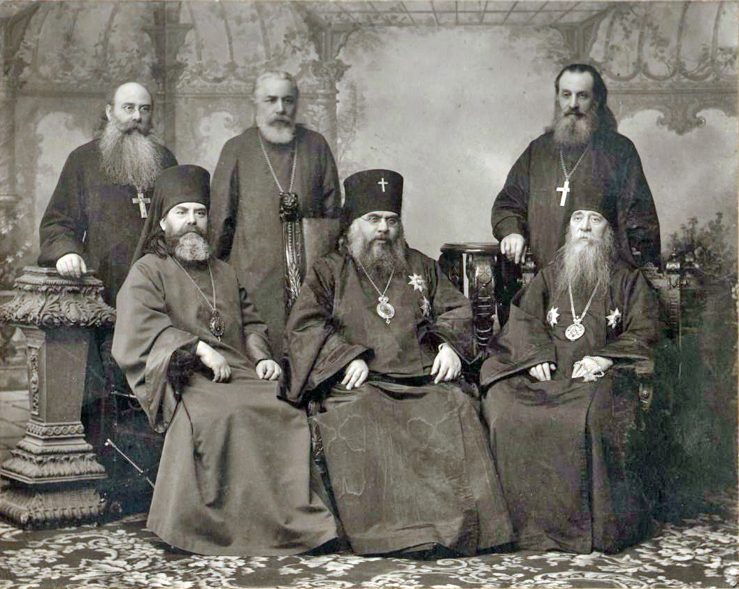 Члены государственного Совета от духовенства: сидят: архиепископ Новгородский Арсений (Стадницкий), архиепископ Варшавский Николай (Зиоров), епископ Вологодский Никон (Рождественский), стоят: протоиерей Симеон Трегубов, протоиерей Дмитрий Беликов, протоиерей Тимофей Буткевич.